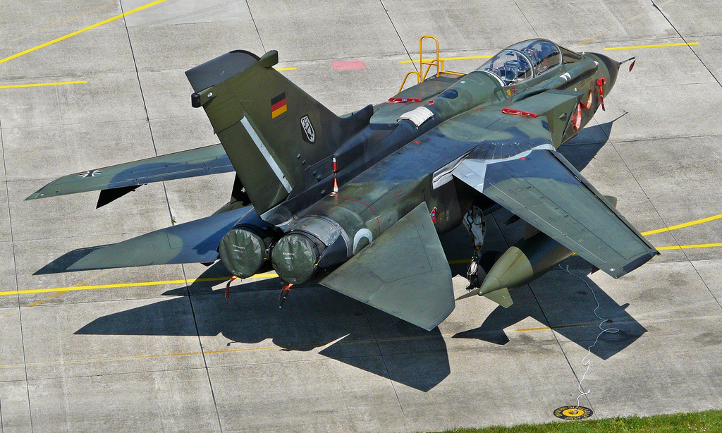 Tornado IDS 46+02 des Jagdbombergeschwaders 33 auf dem Stellplatz vor der Werft (Blick vom Tower).